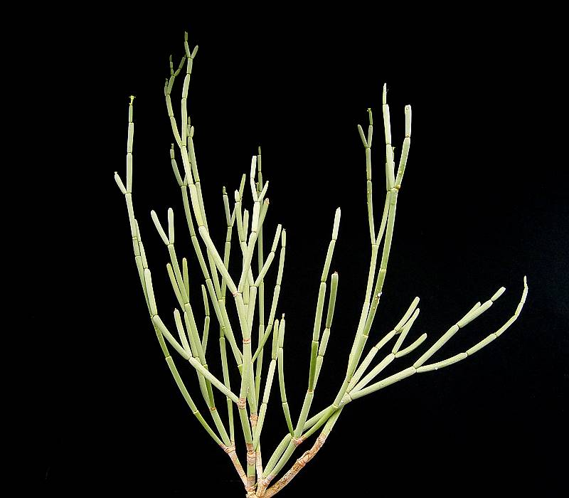 Euphorbia ephedroides var. imminuta